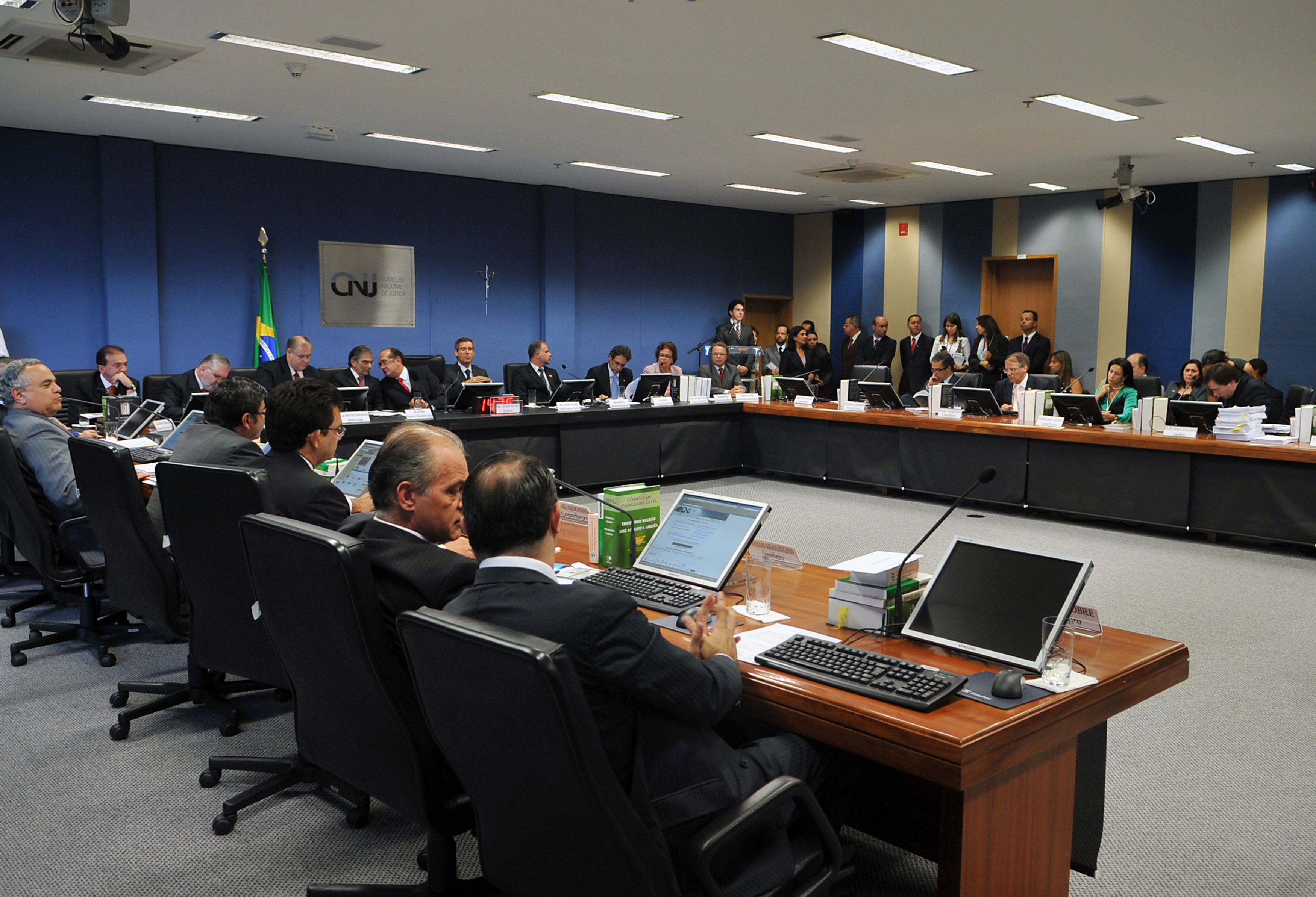 Brasília - O presidente do Supremo Tribunal Federal (STF), Gilmar Mendes, participa da assinatura de acordos de cooperação técnica que abrangem ações e programas do Conselho Nacional de Justiça (CNJ) (Valter Campanato/ABr)